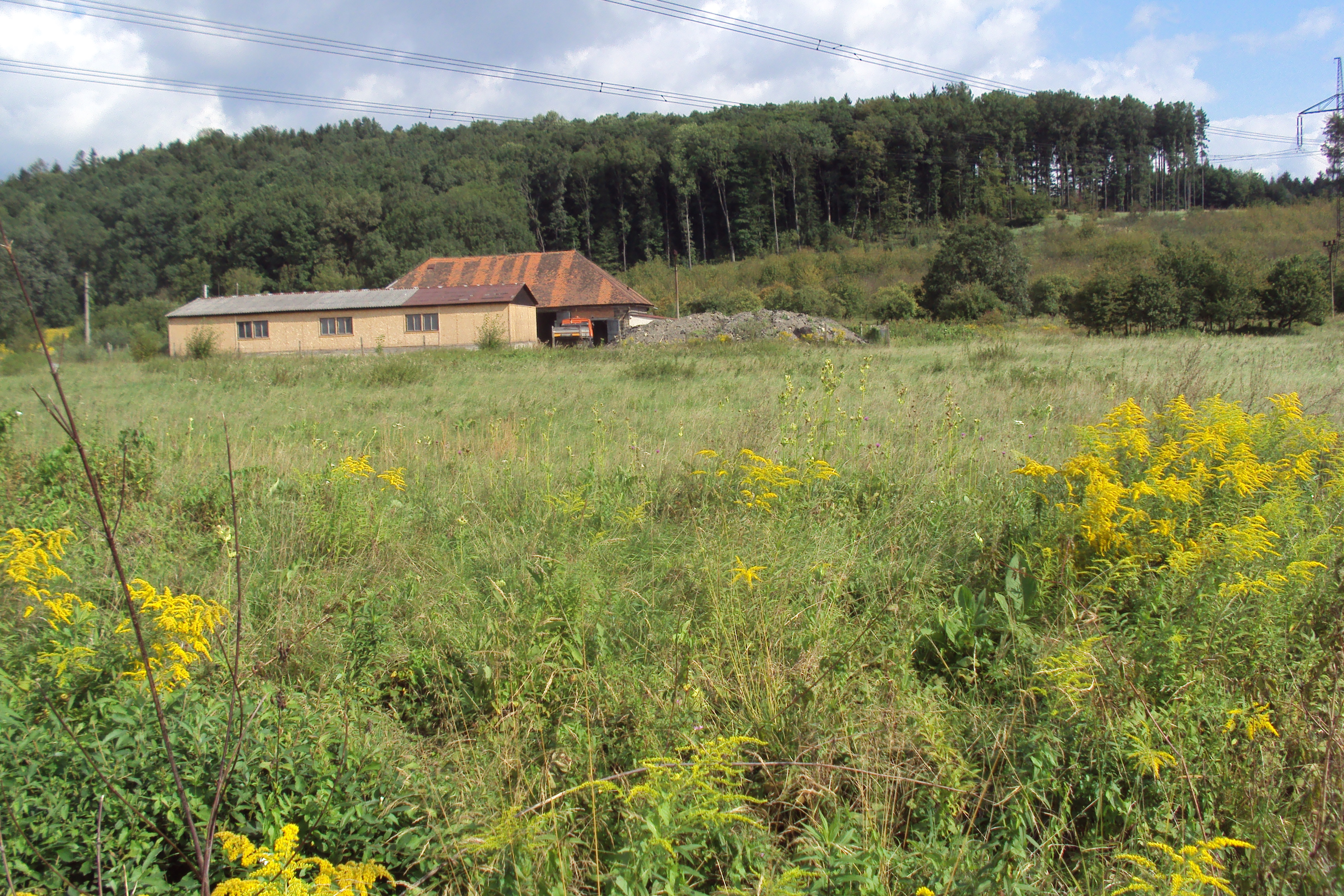 Místní část Podlesí v Zákupech, pár solo stavení